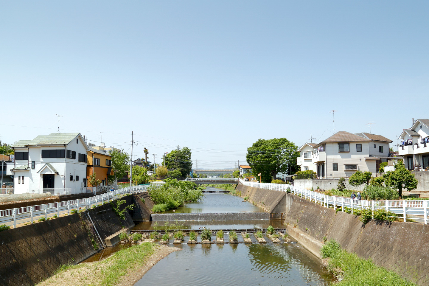 谷地川 (東京都)の画像。 東京都ja:八王子市ja:石川町 (八王子市)で撮影。